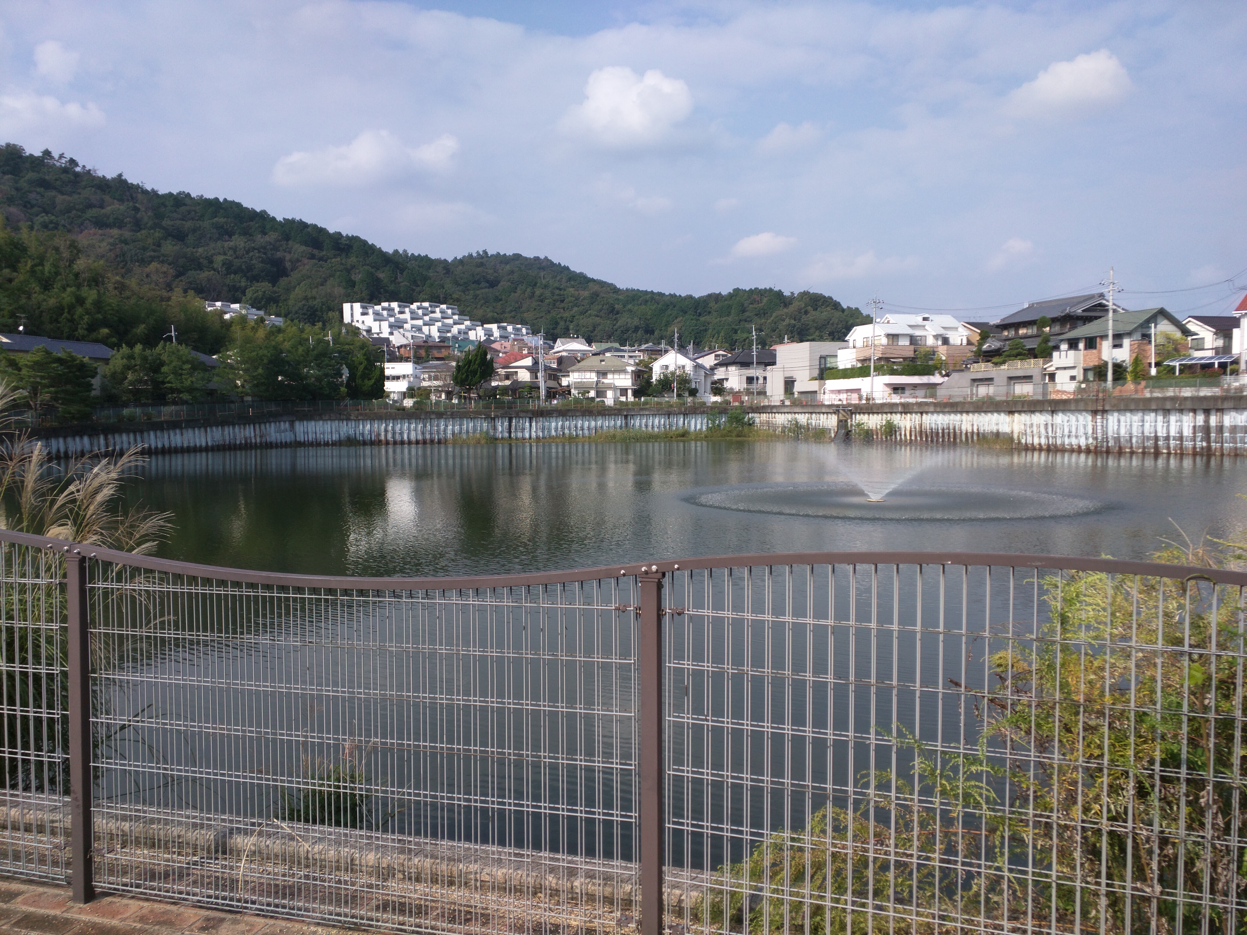 Wikipedia:芋川（大阪府）打越池